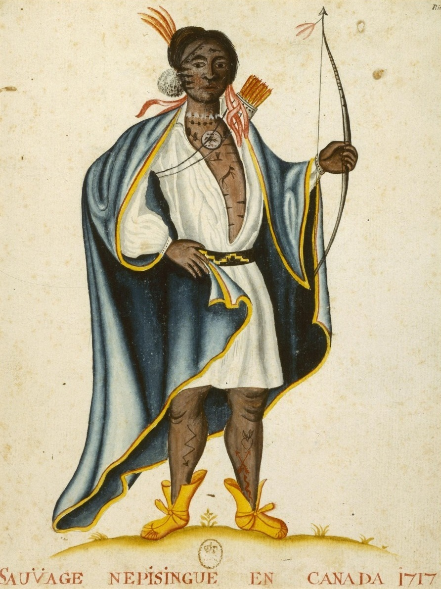 Dessin anonyme d'origine française présentant un « Sauvage Nepisingue » au Canada en 1717. Aquarelle, 23 X 18 cm.